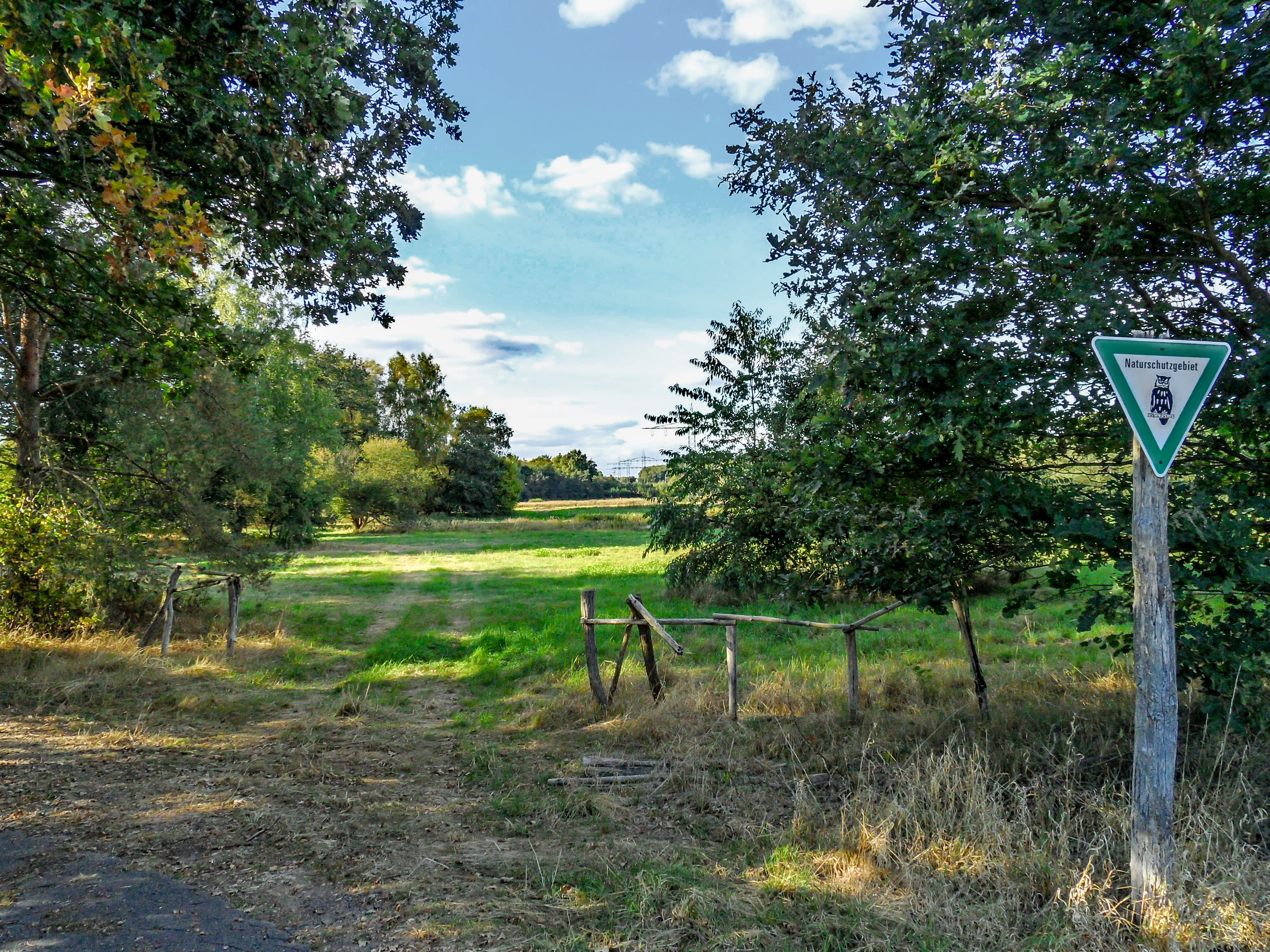 Naturschutzgebiet Closenbruch zwischen Homburg und Sanddorf